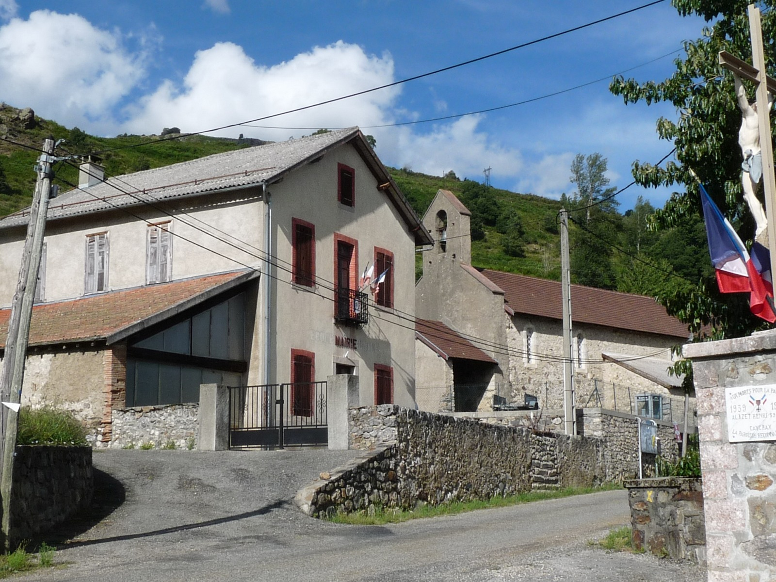 Mairie et église de Caychax, Ariège, France